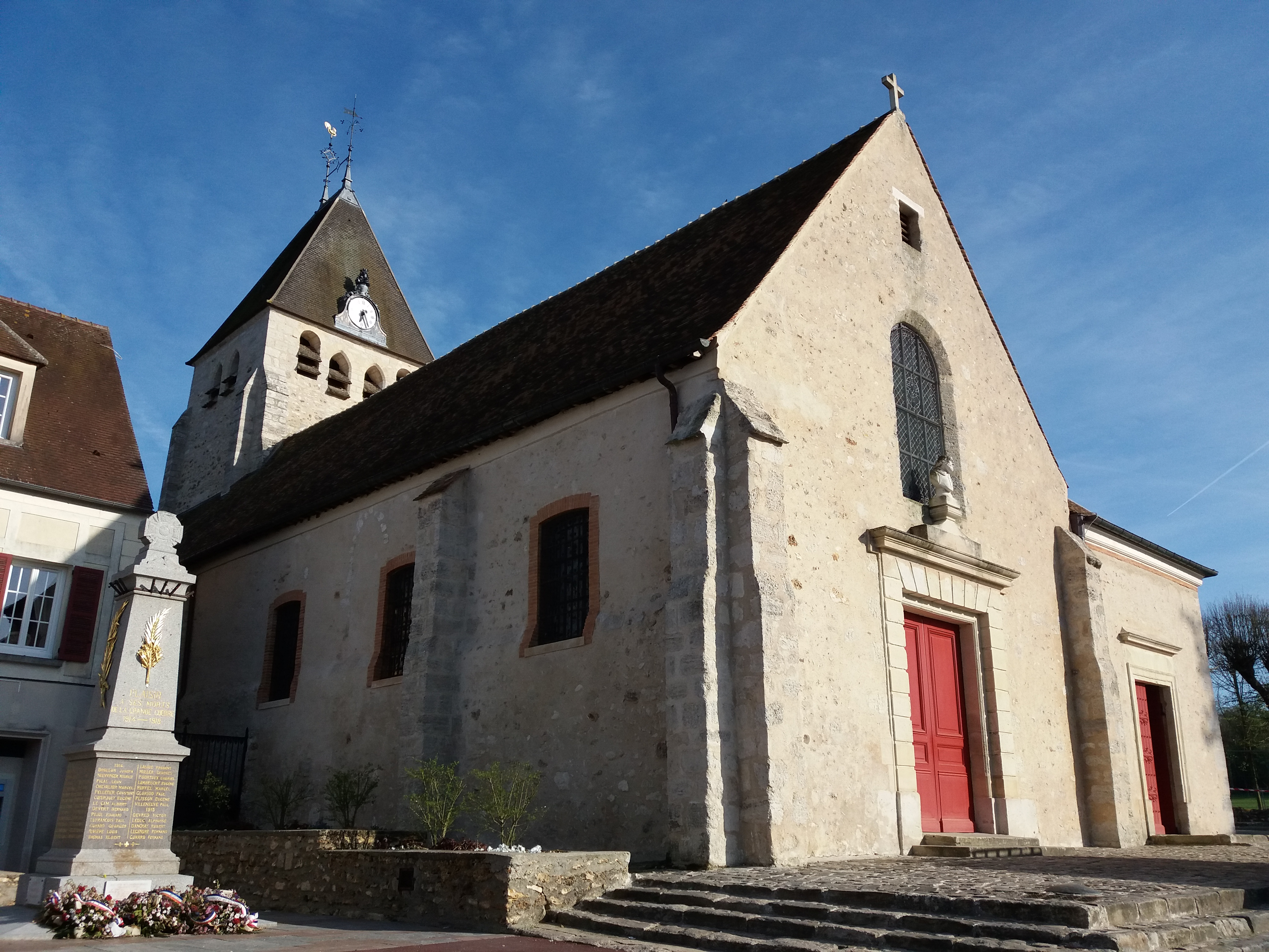 Façade de l'église et monument aux morts.